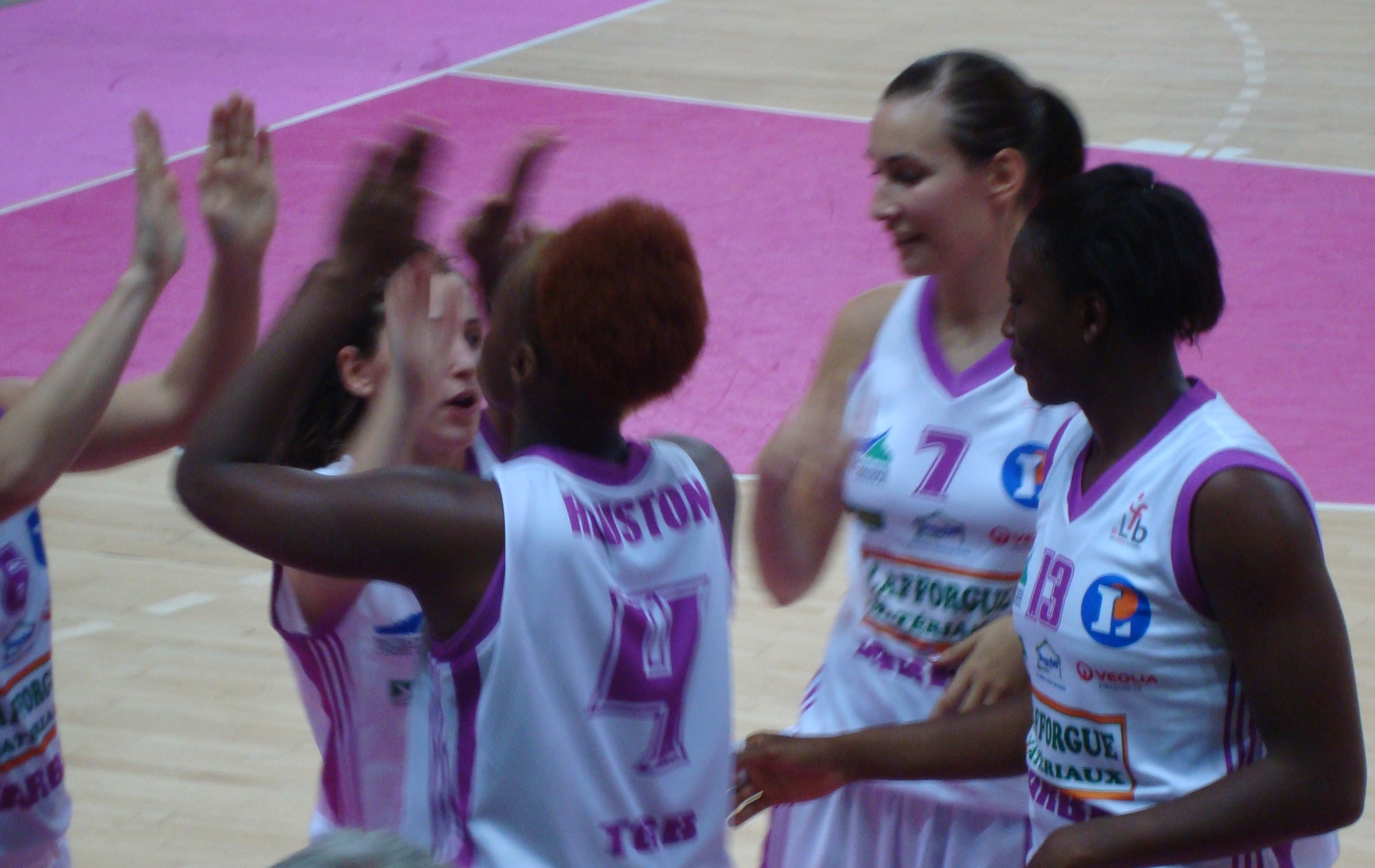 Les joueuses de Tarbes au temps mort